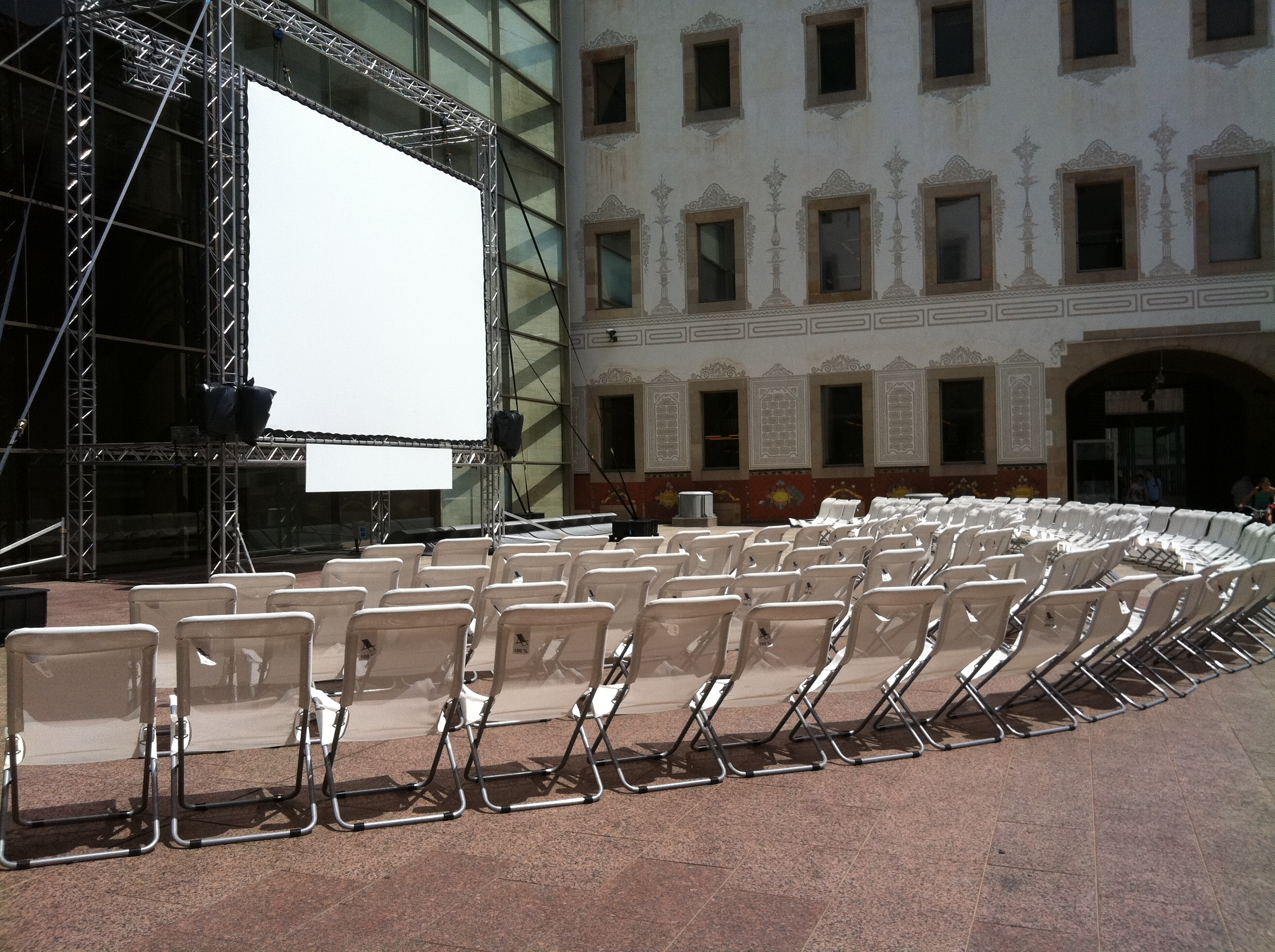 Gandules 2011